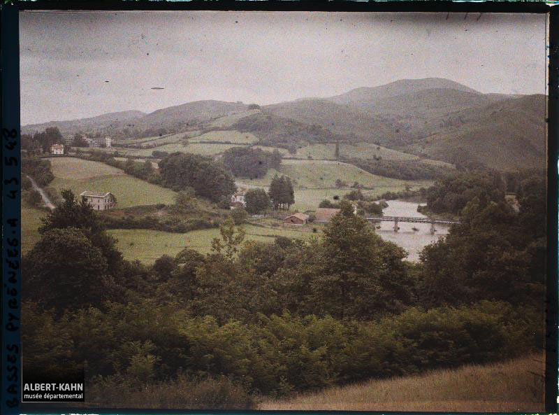 Panorama pris depuis le Haut - Cambo. Auguste Léon, Cambo, France, 30 juillet 1924, (Autochrome), Auguste Léon, Département des Hauts-de-Seine, musée Albert-Kahn, Archives de la Planète, A 43 548